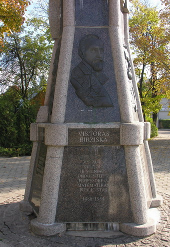 Viktoras Biržiška. Viekšniuose pastatyto paminklo Biržiškoms fragmentas. Fotografavo Algirdas, 2005 m. spalio 20 d.